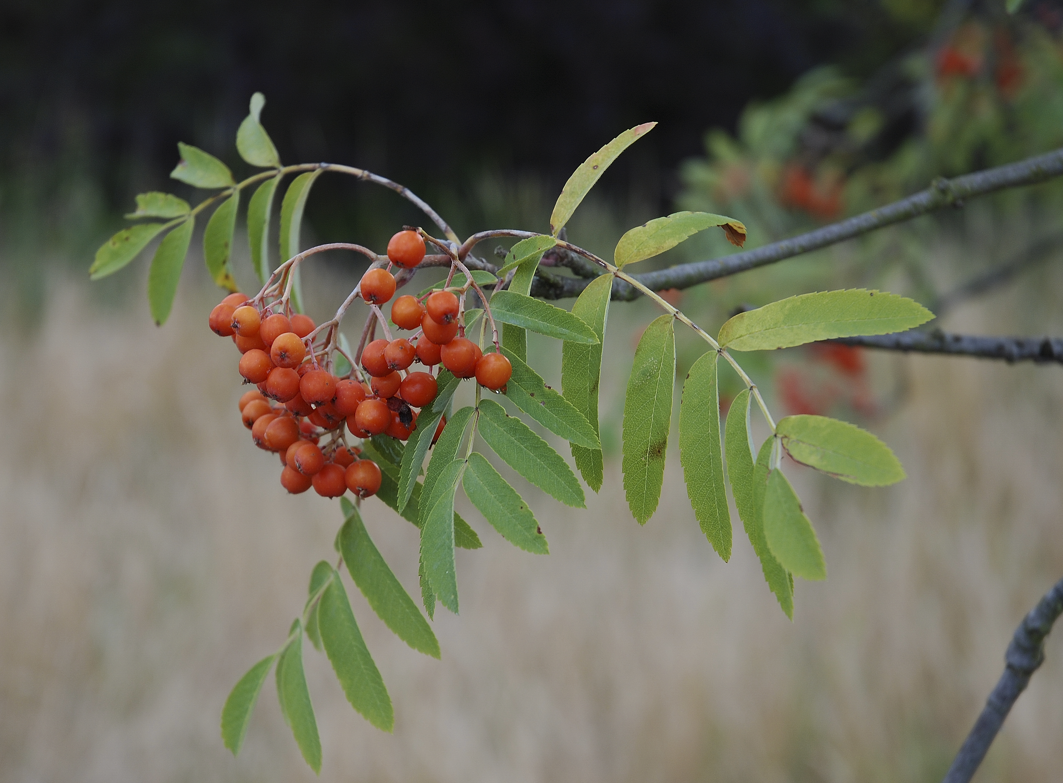 Vogelbeere oder Eberesche (Sorbus aucuparia, L. ; Syn. Pyrus aucuparia, Gaertner)